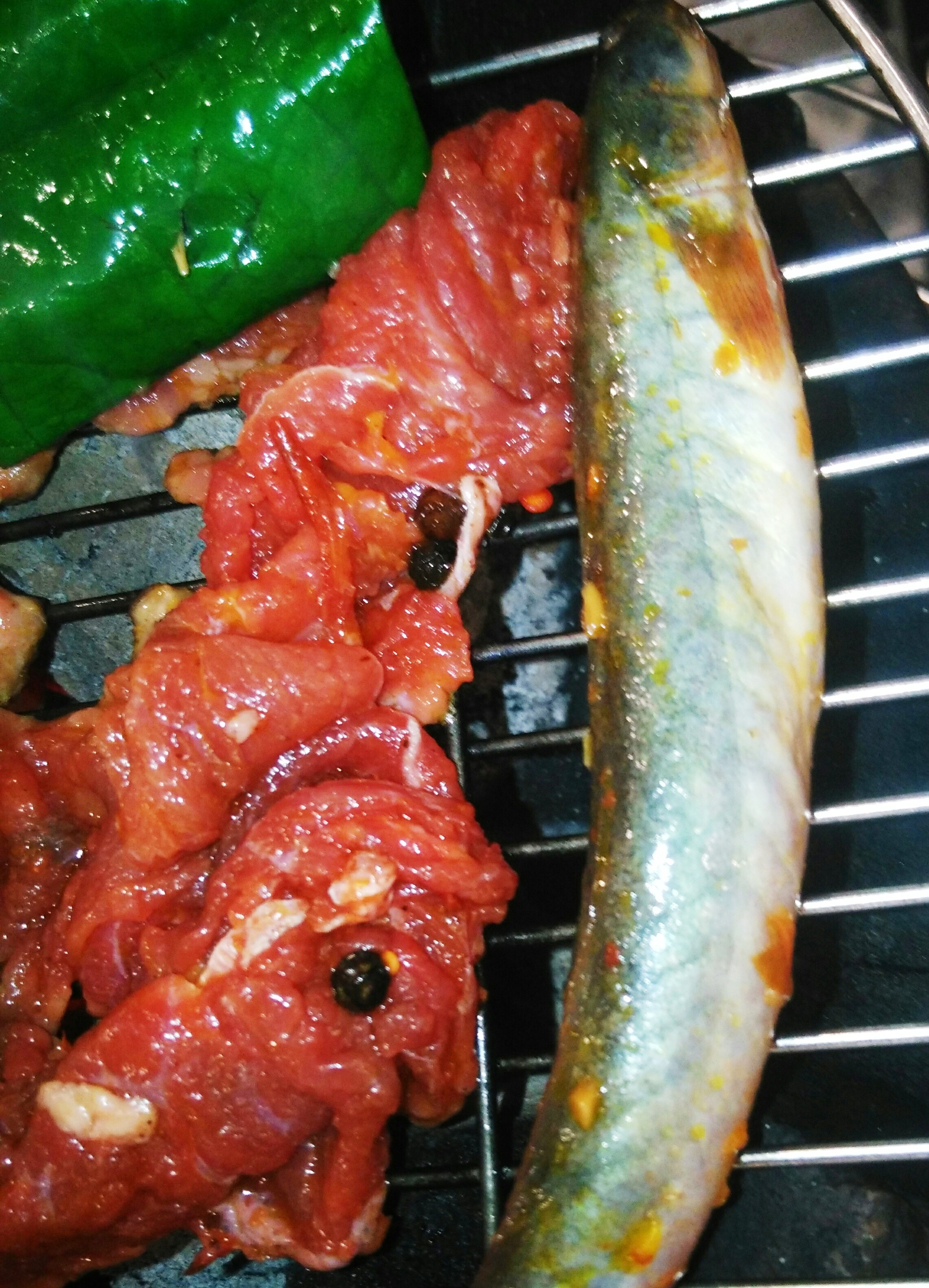 Món nướng tại quán chú Tèo 2 (cá kèo nướng) ở Binh Tân tháng 10 năm 2016